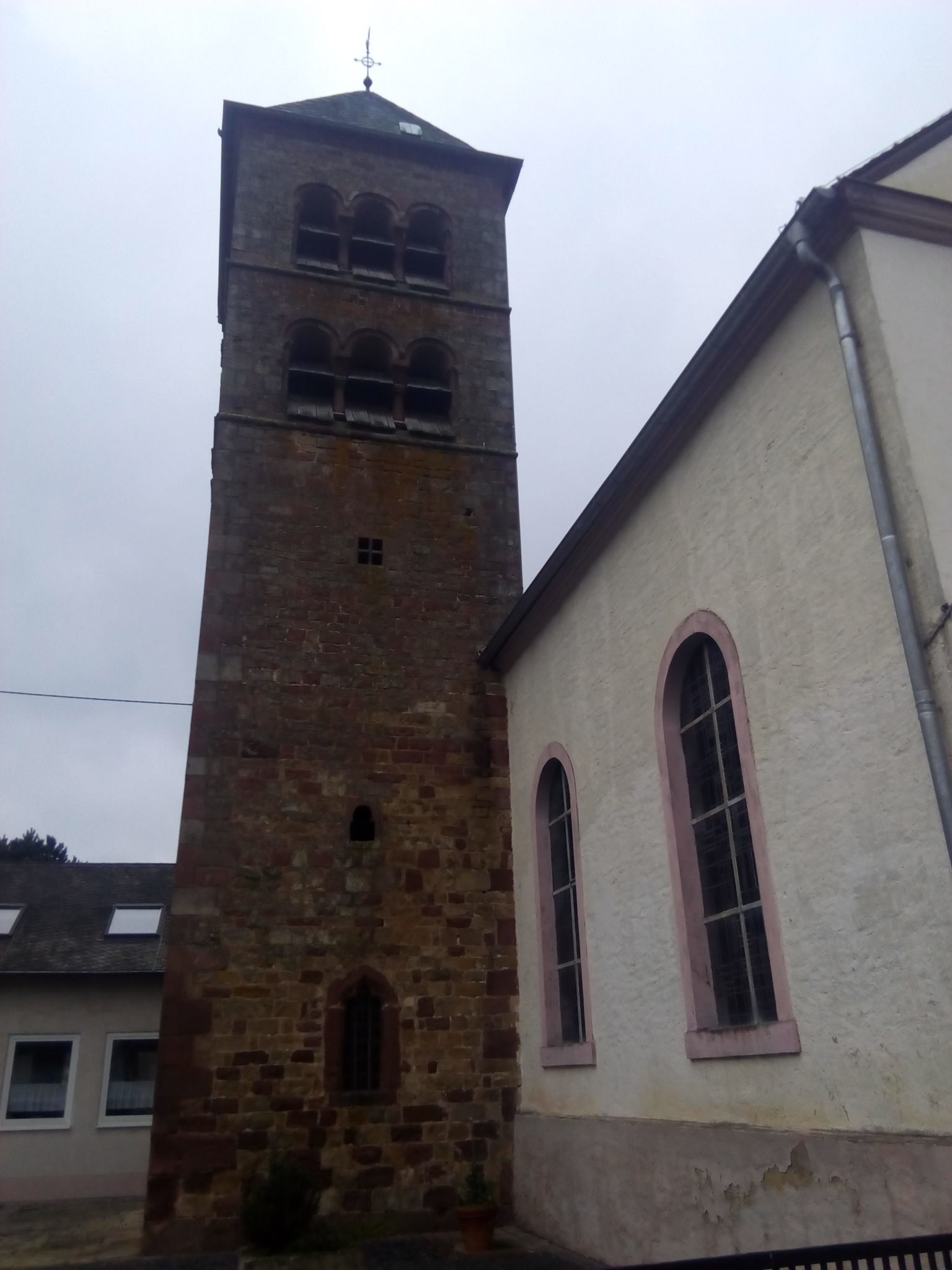 Gesamtansicht